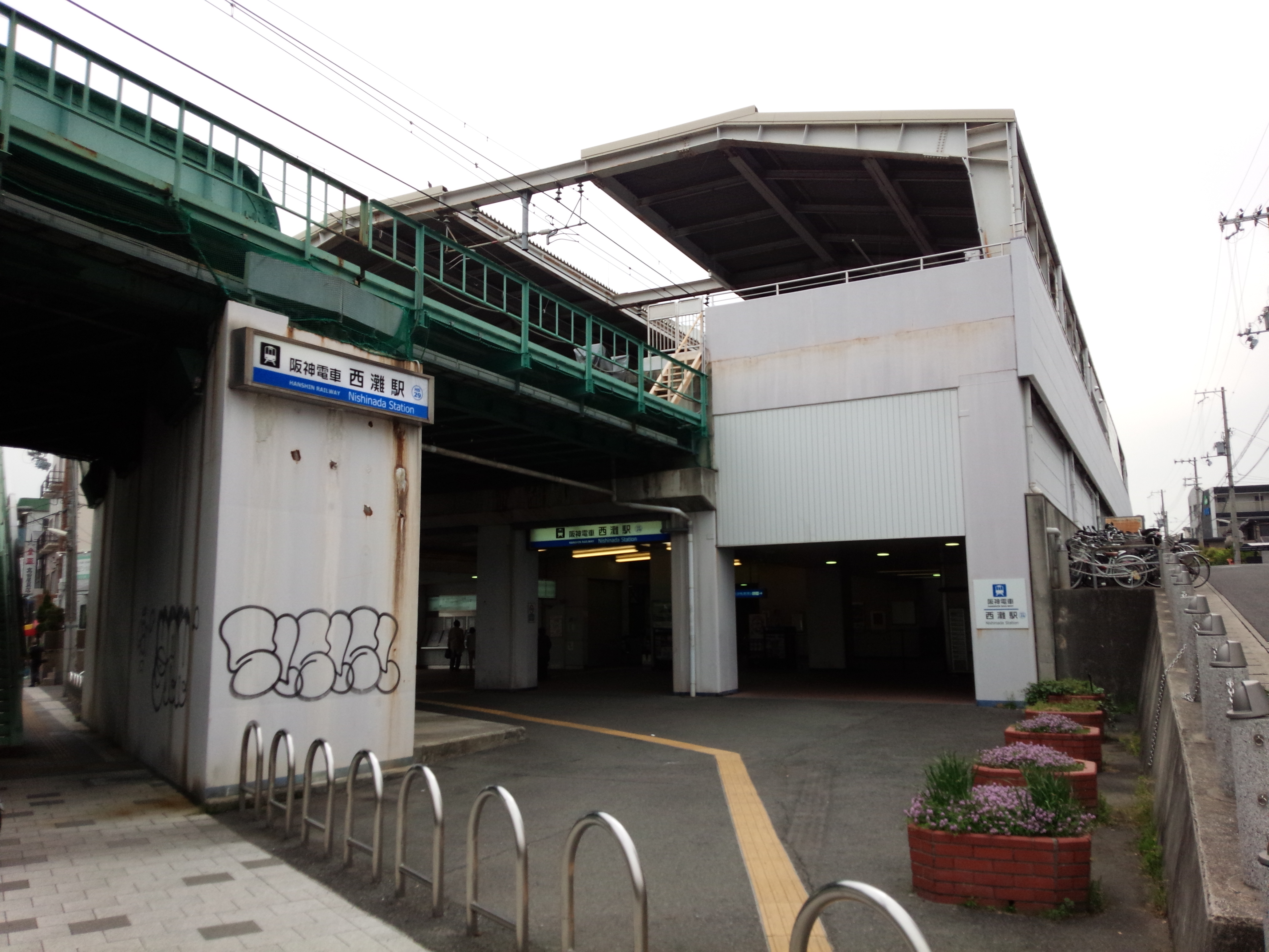 2014年4月22日撮影